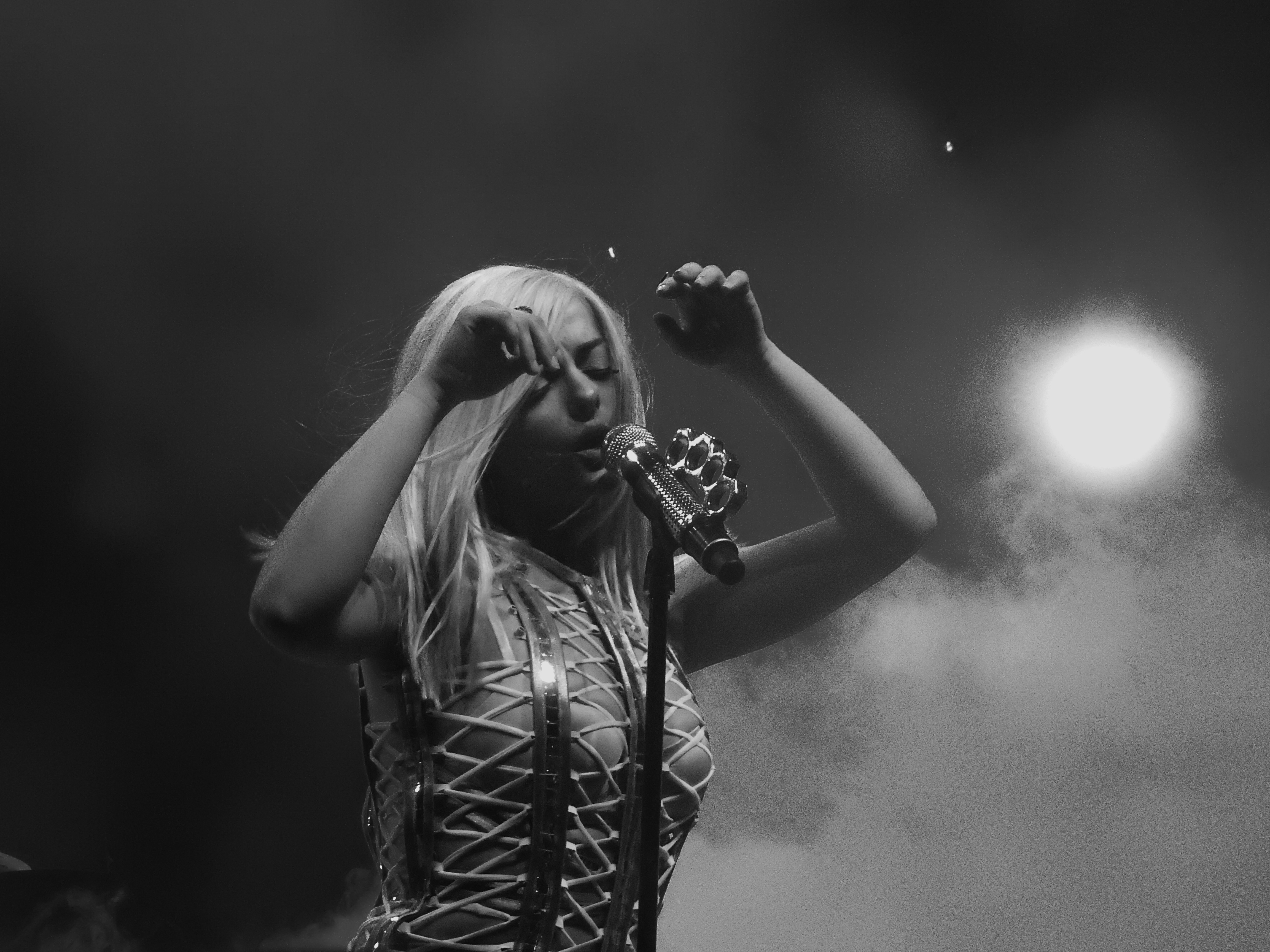 Bebe Rexha, Koko, London